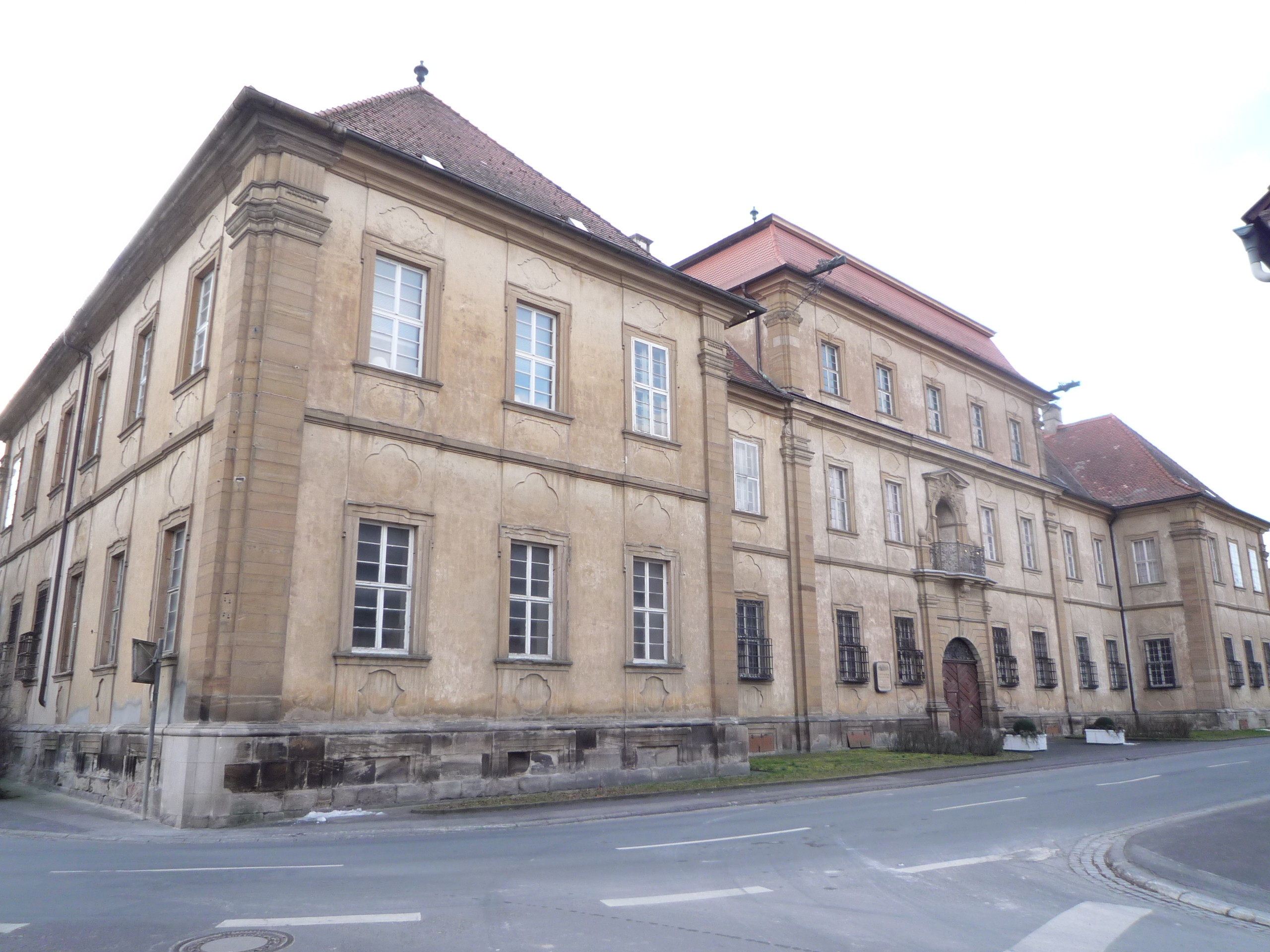 Schloß Sulzheim, Blick von der Straße aus